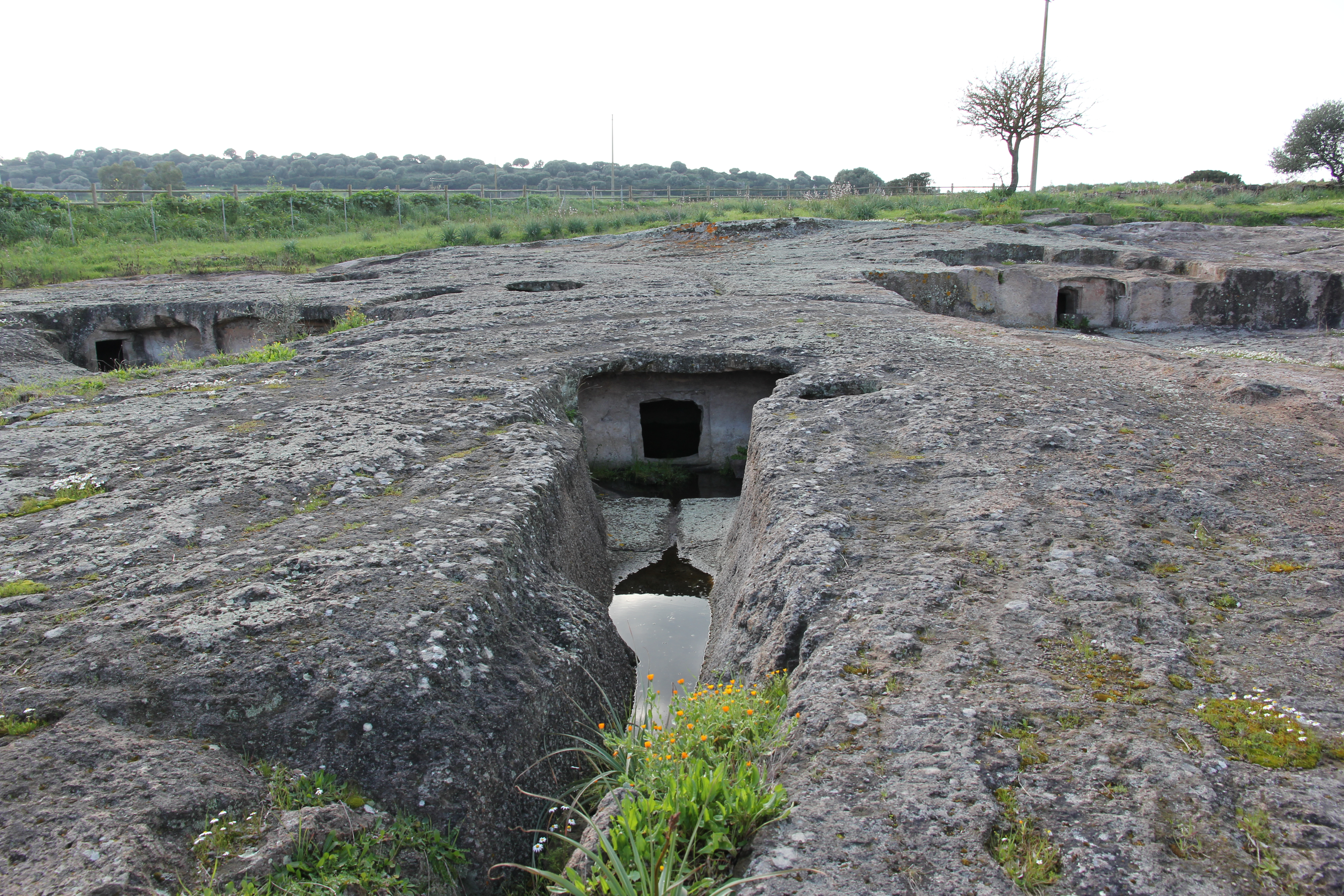 Chiaramonti - Necropoli di Su Murrone